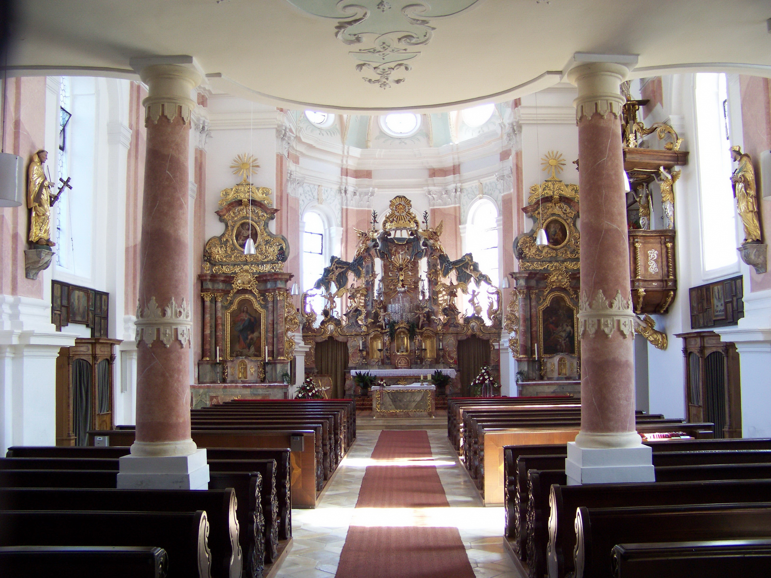 Hohenthann, Heiligenbrunn. Wallfahrtskirche Mariä Heimsuchung. Barockbau von Hans Widtmann, 1712/14; mit Ausstattung.